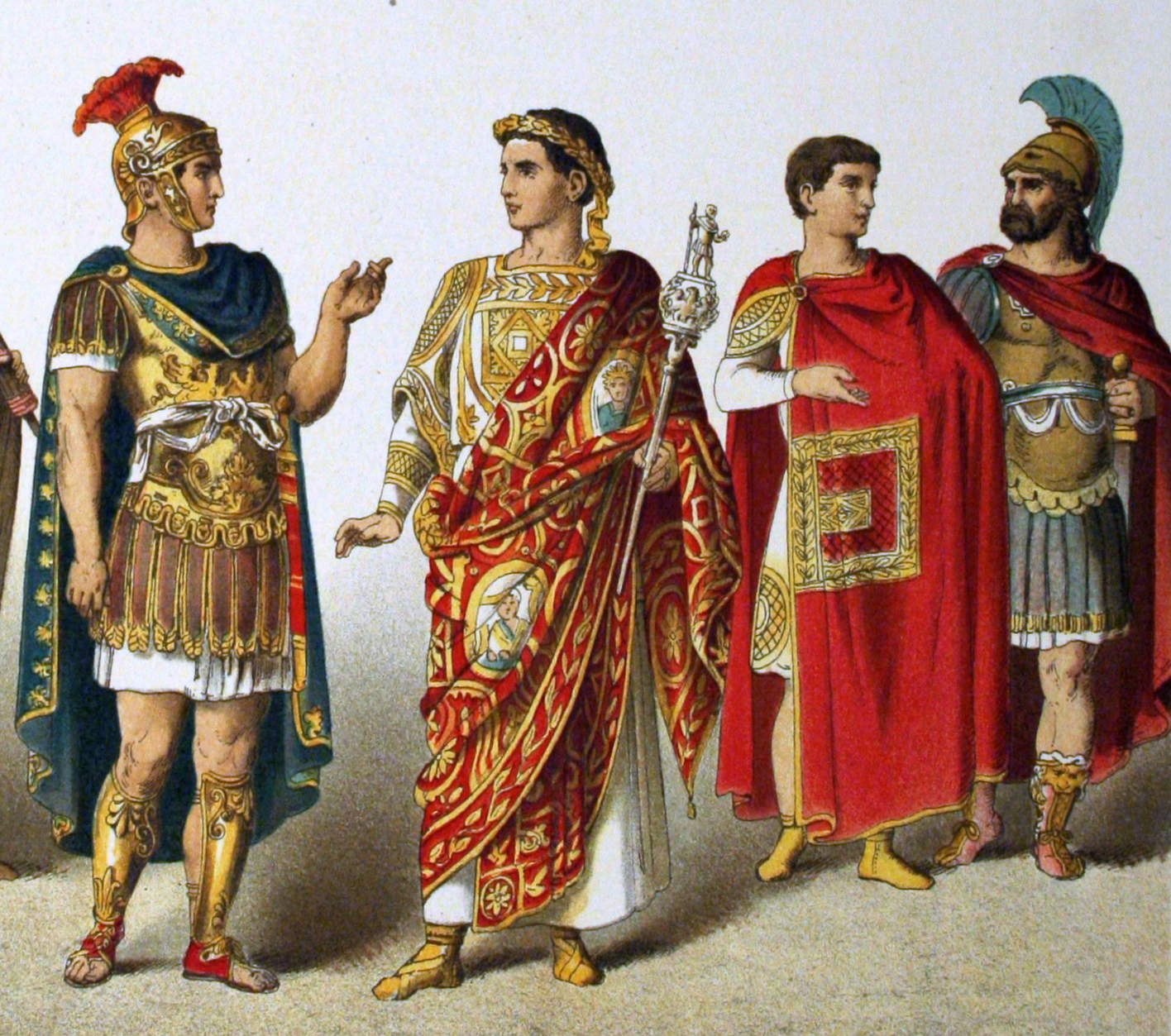 Ancient Times, Roman